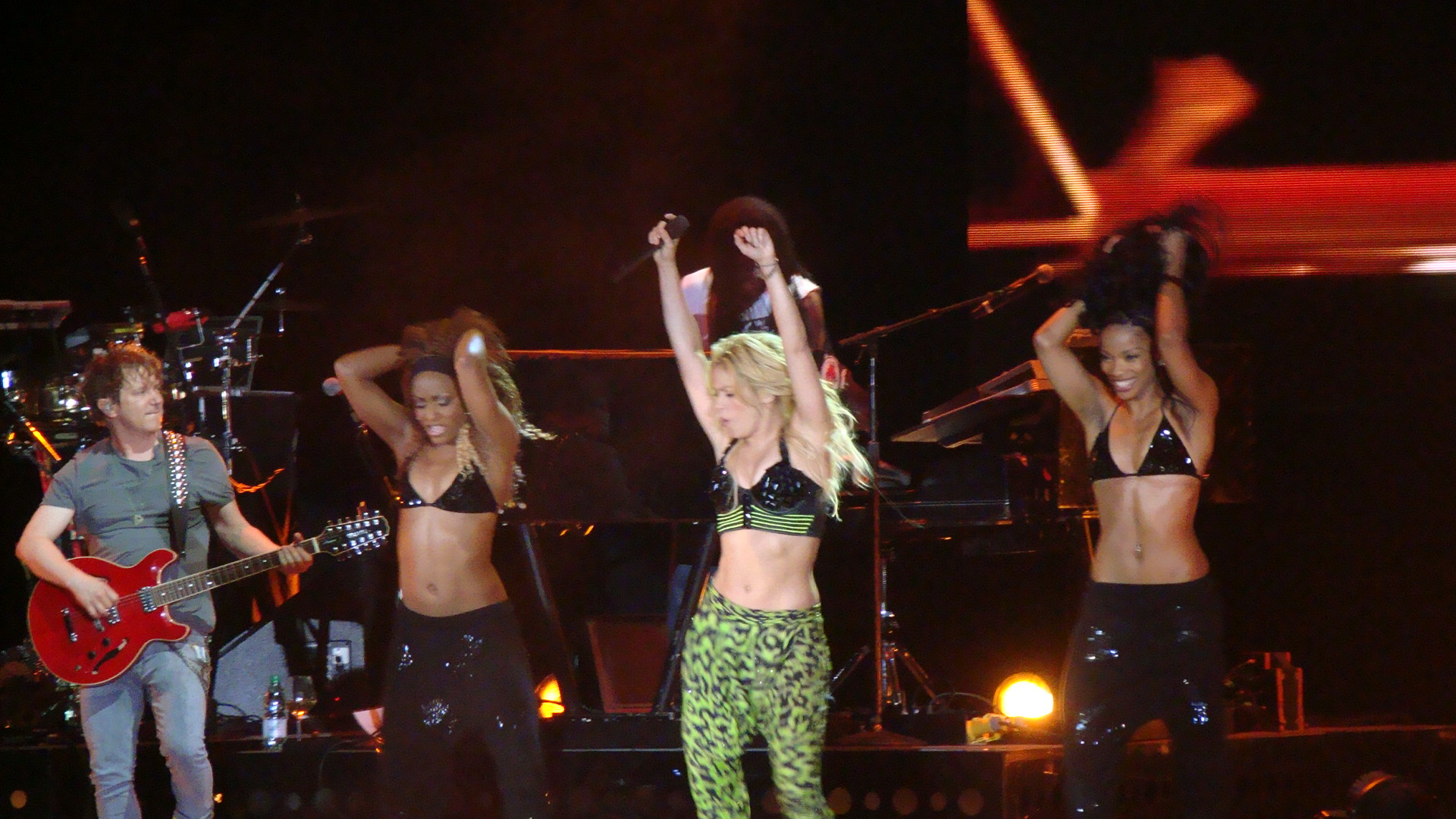 Shakira interpretando Loca durante el Sale el Sol World Tour, el 6 de marzo de 2011, en Punta del Este, Uruguay.